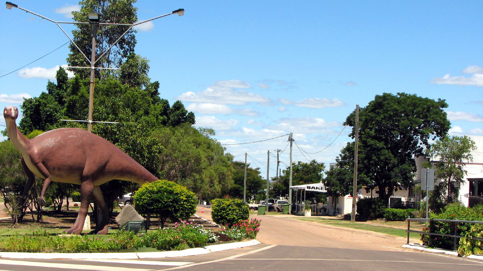 Hughenden, Queensland - Dinosaur